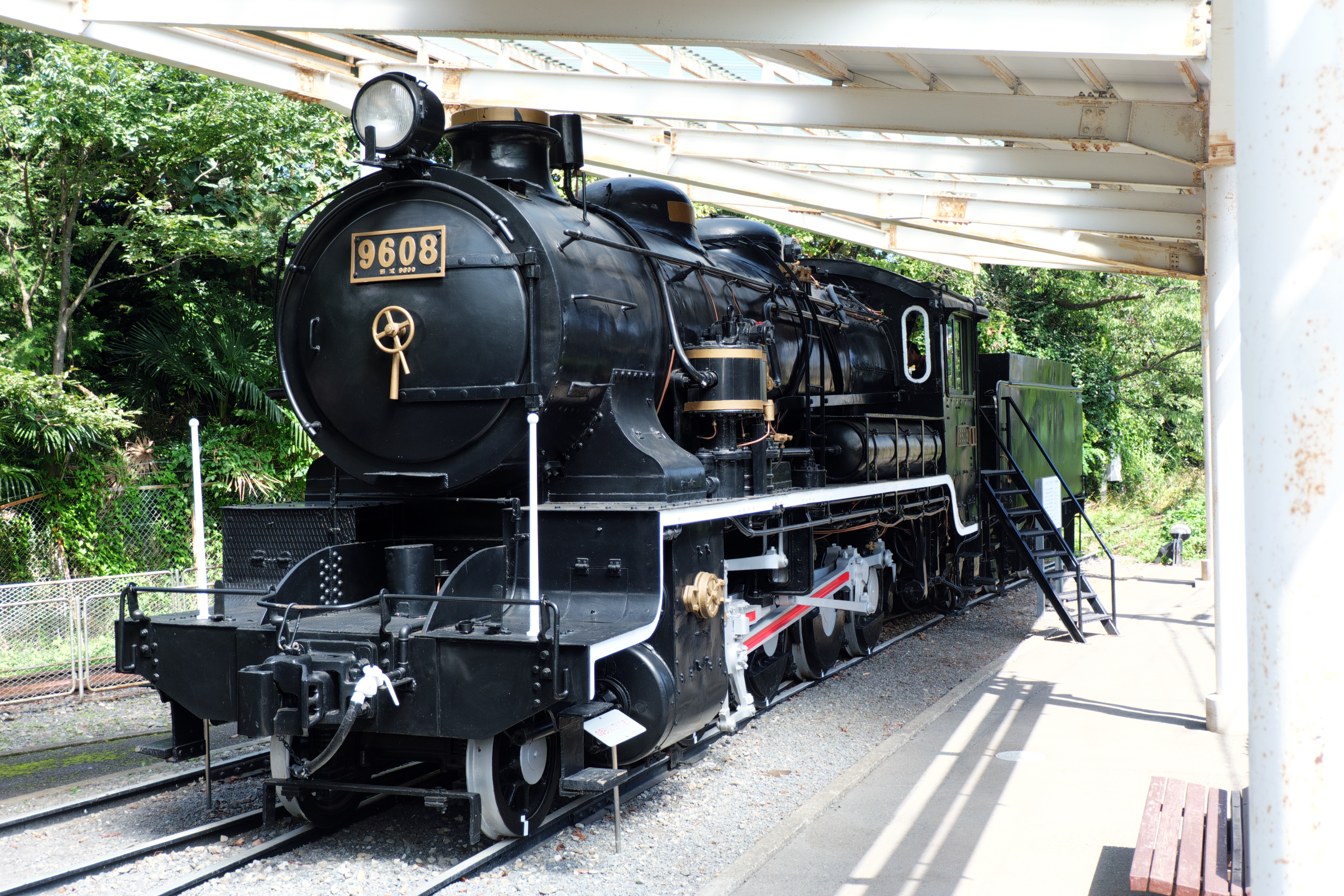 国鉄9608号蒸気機関車（青梅鉄道公園にて撮影）